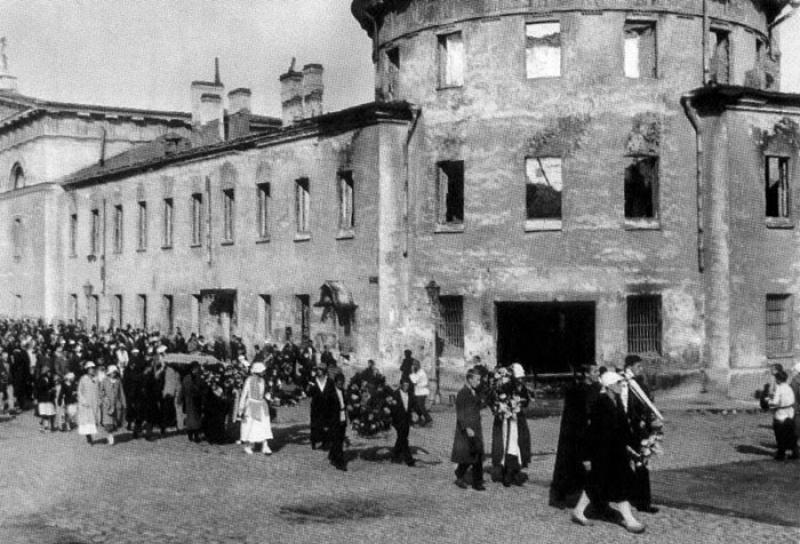 Похороны А. Блока. Литовский замок.